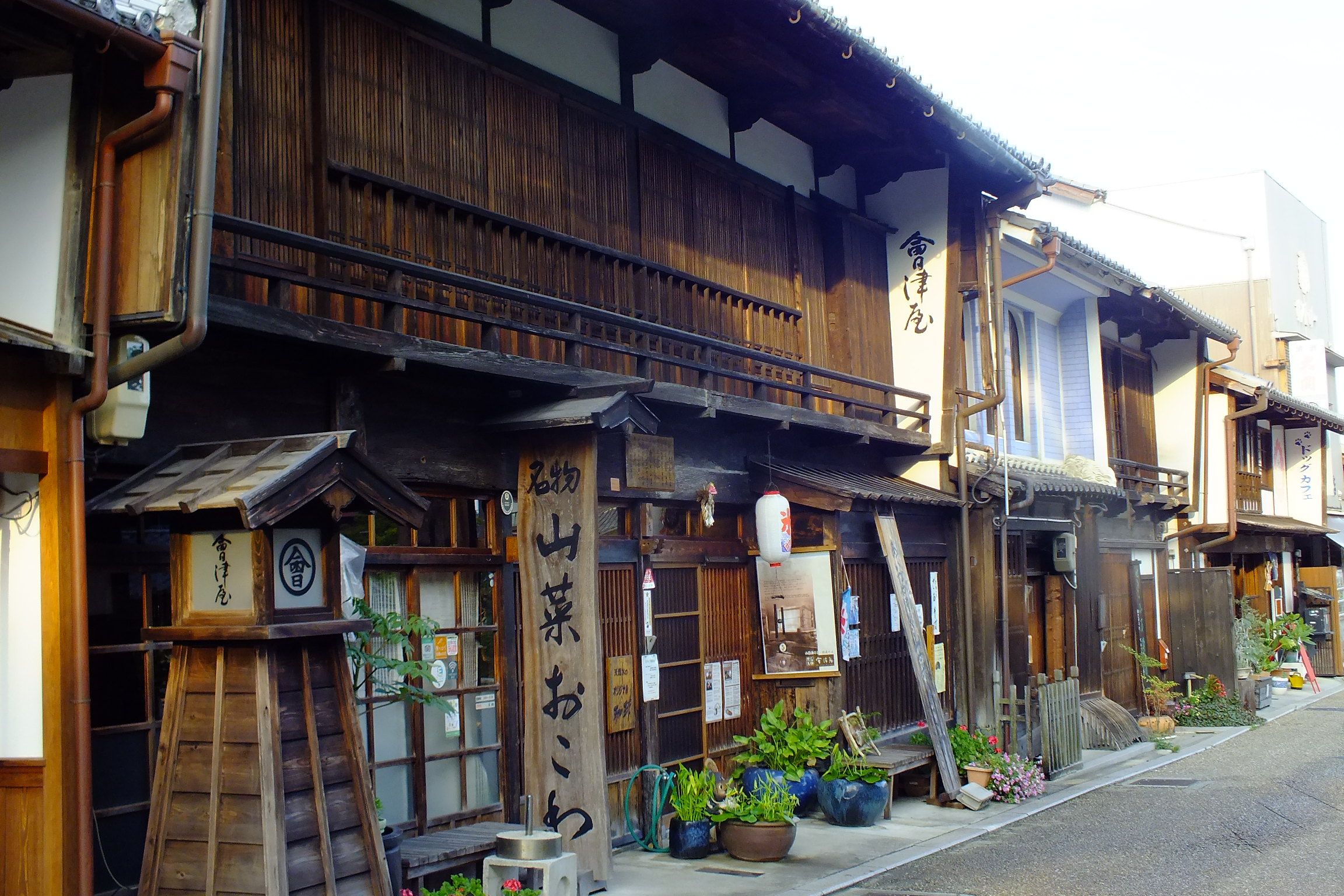 2016-08-05 Tokaido Seki Juku Kameyama City Mie,東海道五十三次 関宿